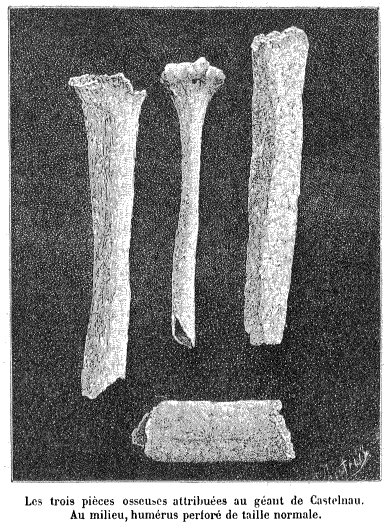 illustration extraite de la publication de Georges Vacher de Lapouge (1854-1936) consacrée au Géant de Castelnau